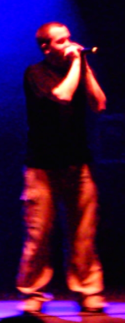 Sänger Nesti live